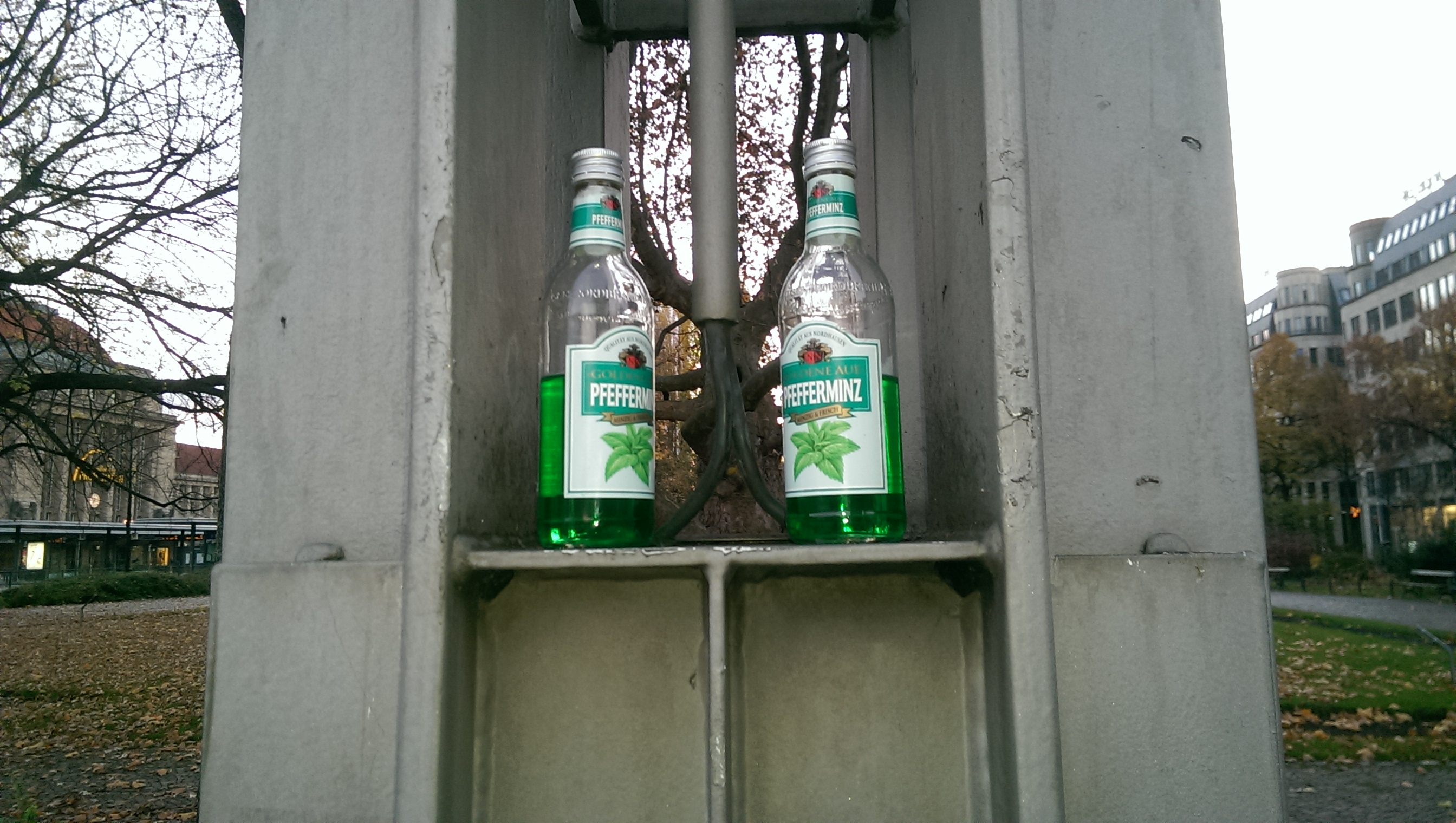 Pfeffi-Flaschen in Leipzig